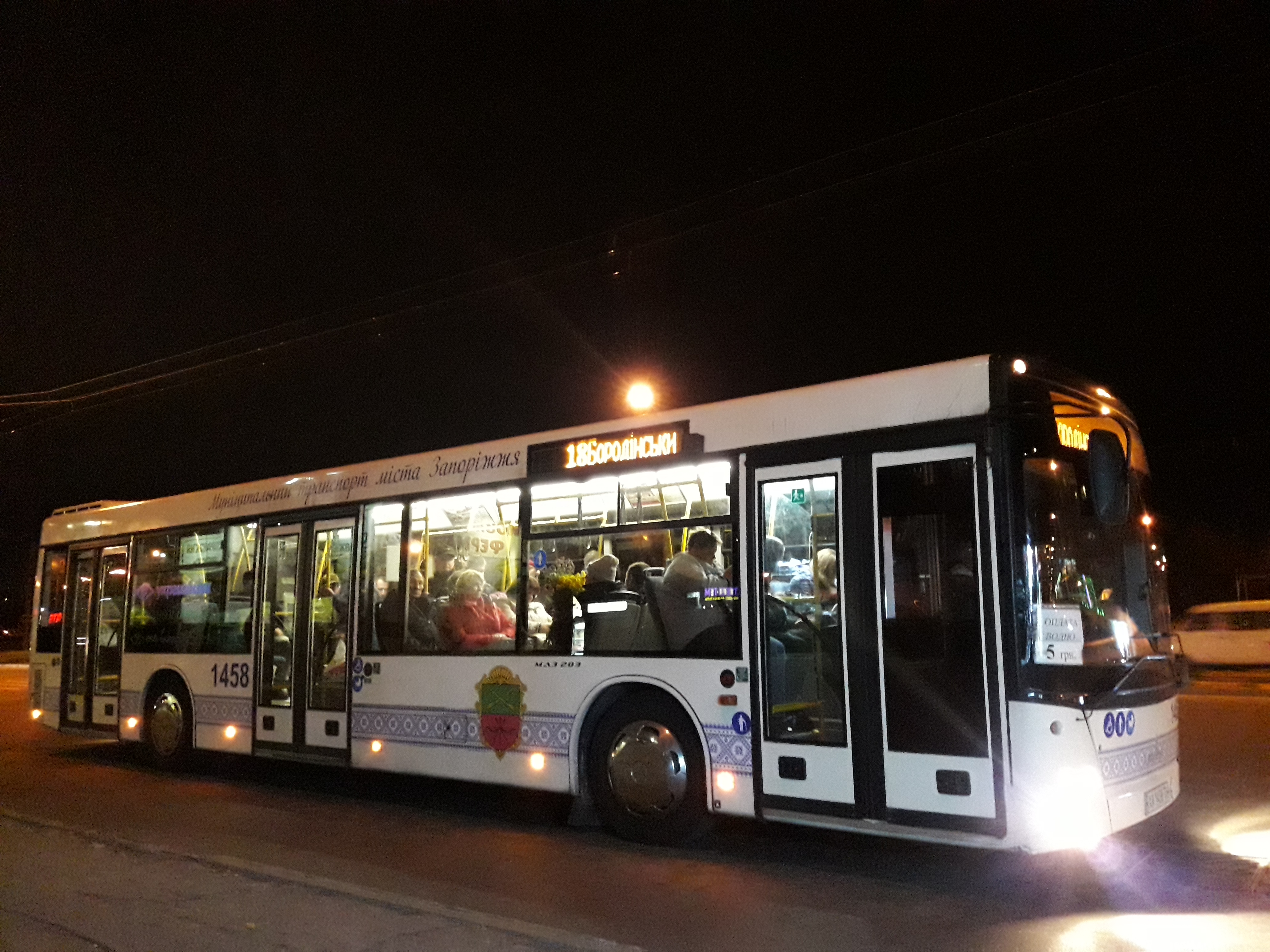 Фото було зроблено на зупинці громадського транспорту вул. Автозаводська. Зображено автобус номер 18, маршрут: Бородинський мкрн. - 4-й Південний мкрн. Місткість 105 пасажирів. Виробництво "МАЗ" та "ЮжМаш".